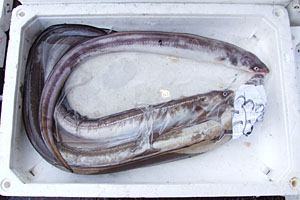 讃岐名物 べえすけ